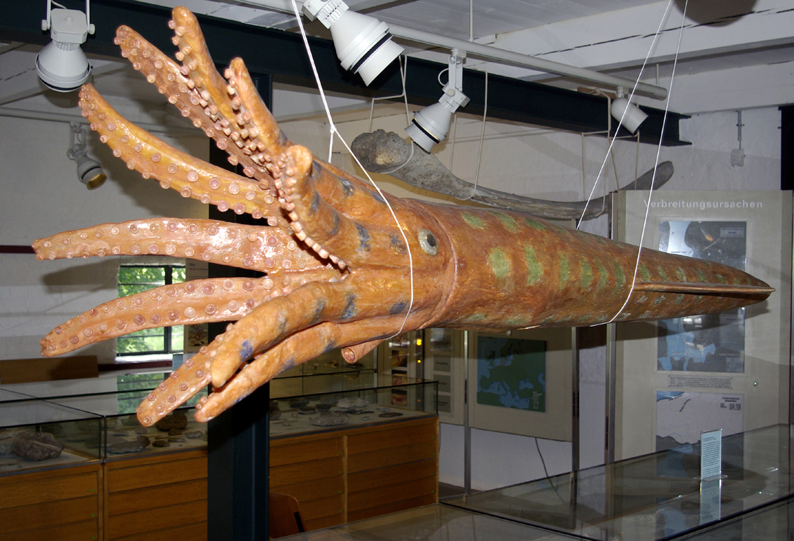 Modell eines Kopffüßers